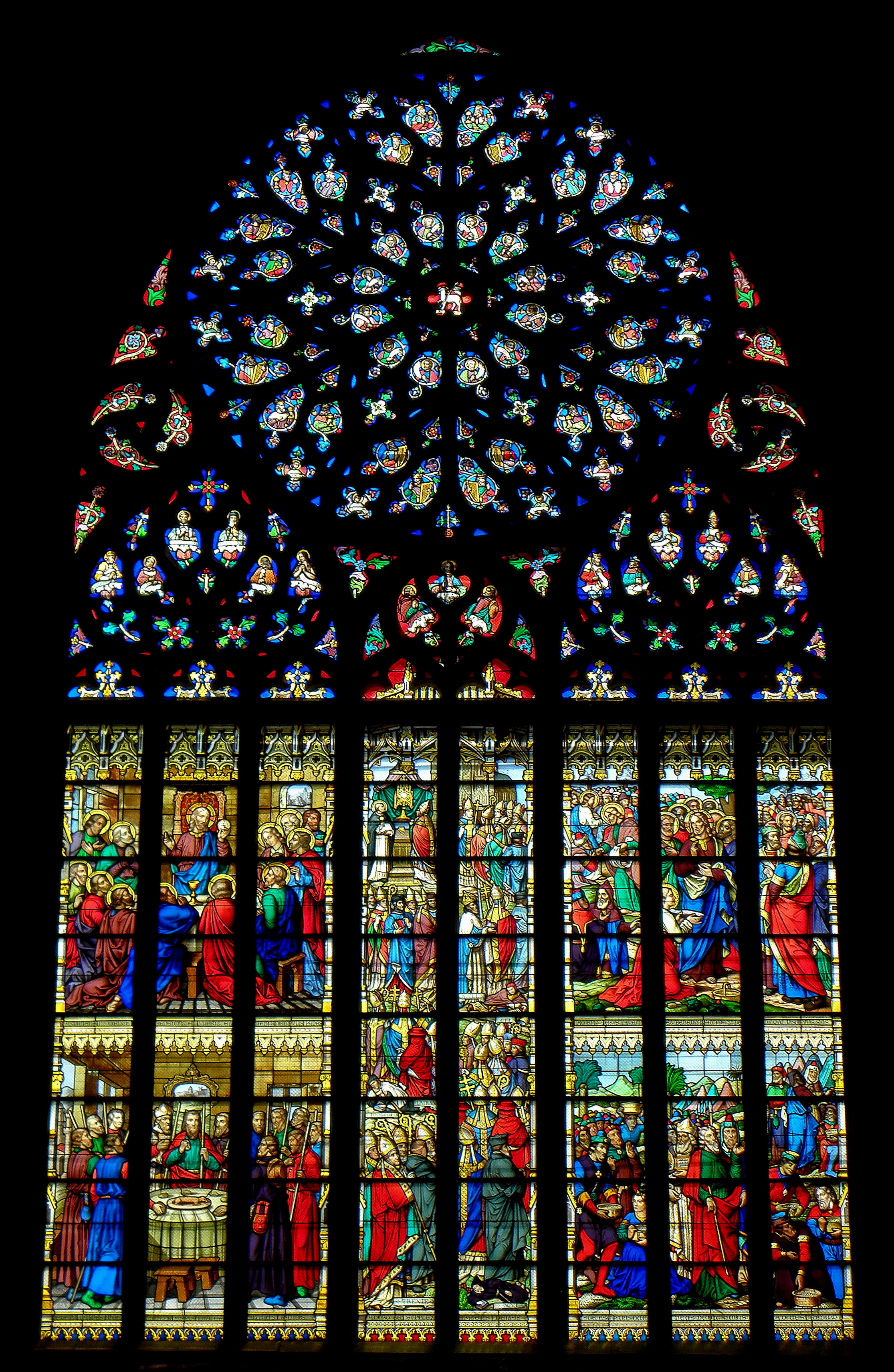 Maîtresse-vitre du transept sud de la cathédrale Saint-Étienne de Saint-Brieuc (22).